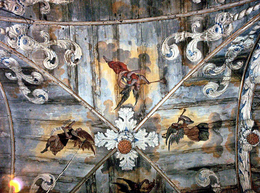 Sanktuarium w Brzesku koło Pyrzyc - pseudosklepienie